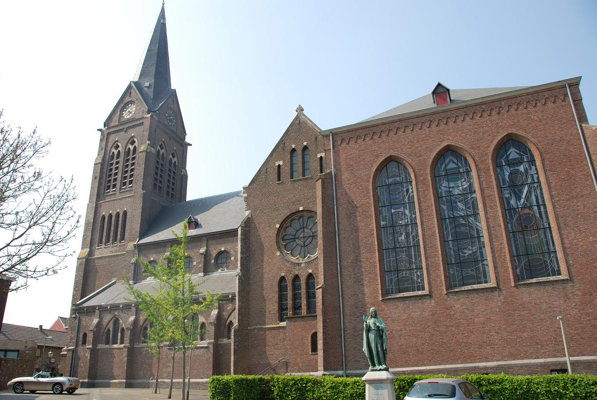 Limburgs: De kèrk van Bóches (Bocholtz) foto: Els Diederen 2007 Aelske